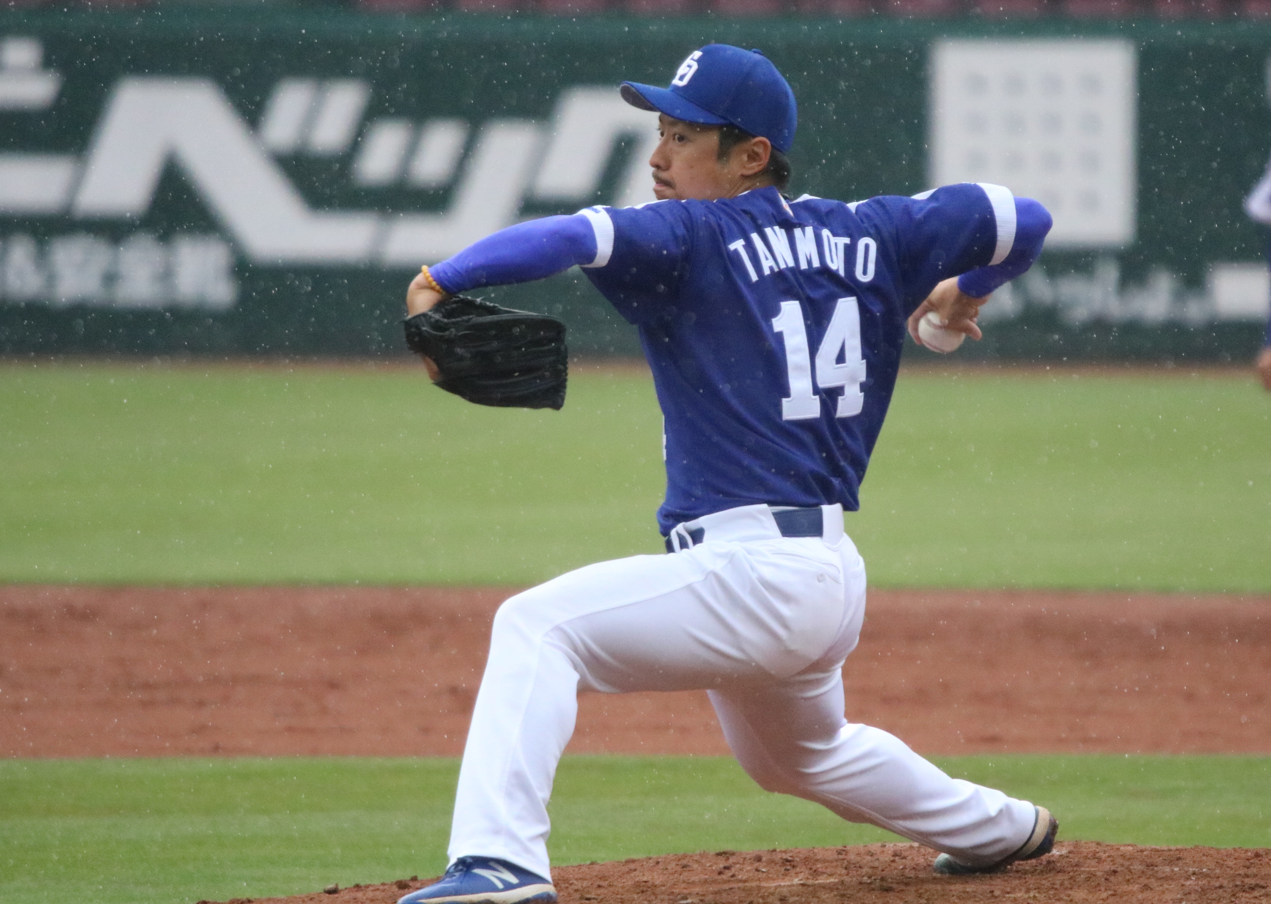 2018年4月14日 ウエスタンリーグ